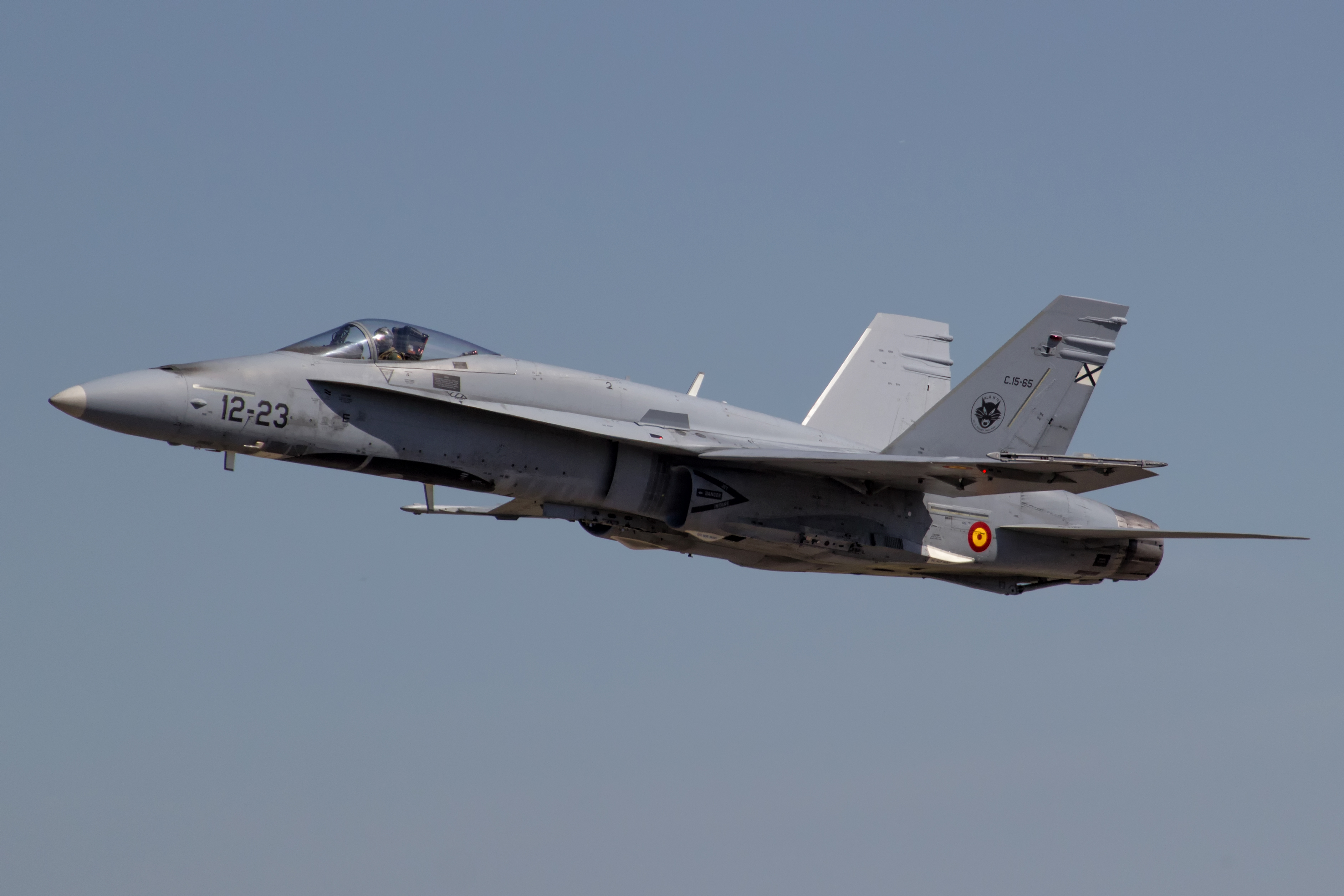 EF-18 do Exército do Aire español no aeroporto de León.